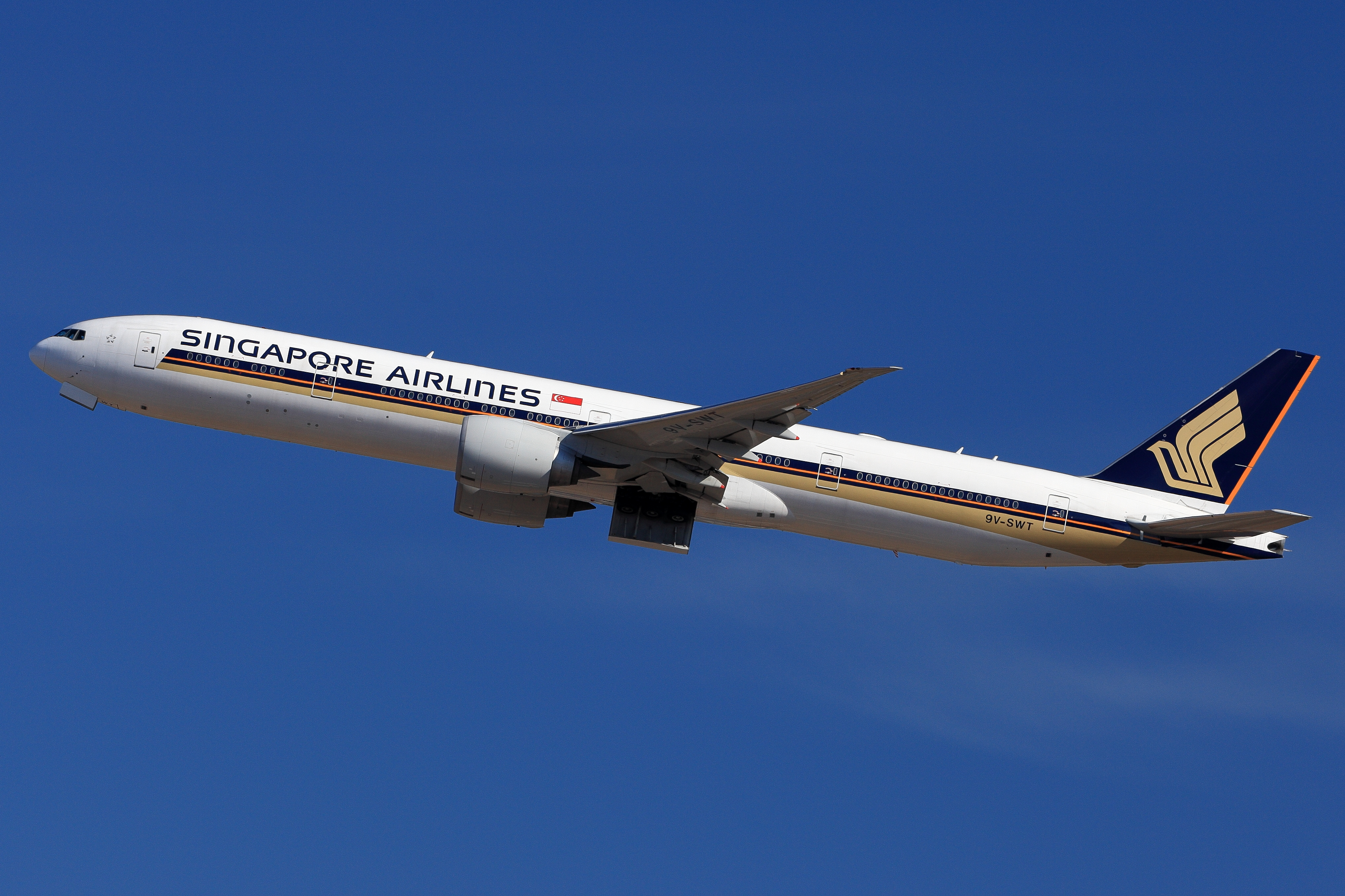 成田国際空港で撮影された、シンガポール航空のボーイング777-300型機